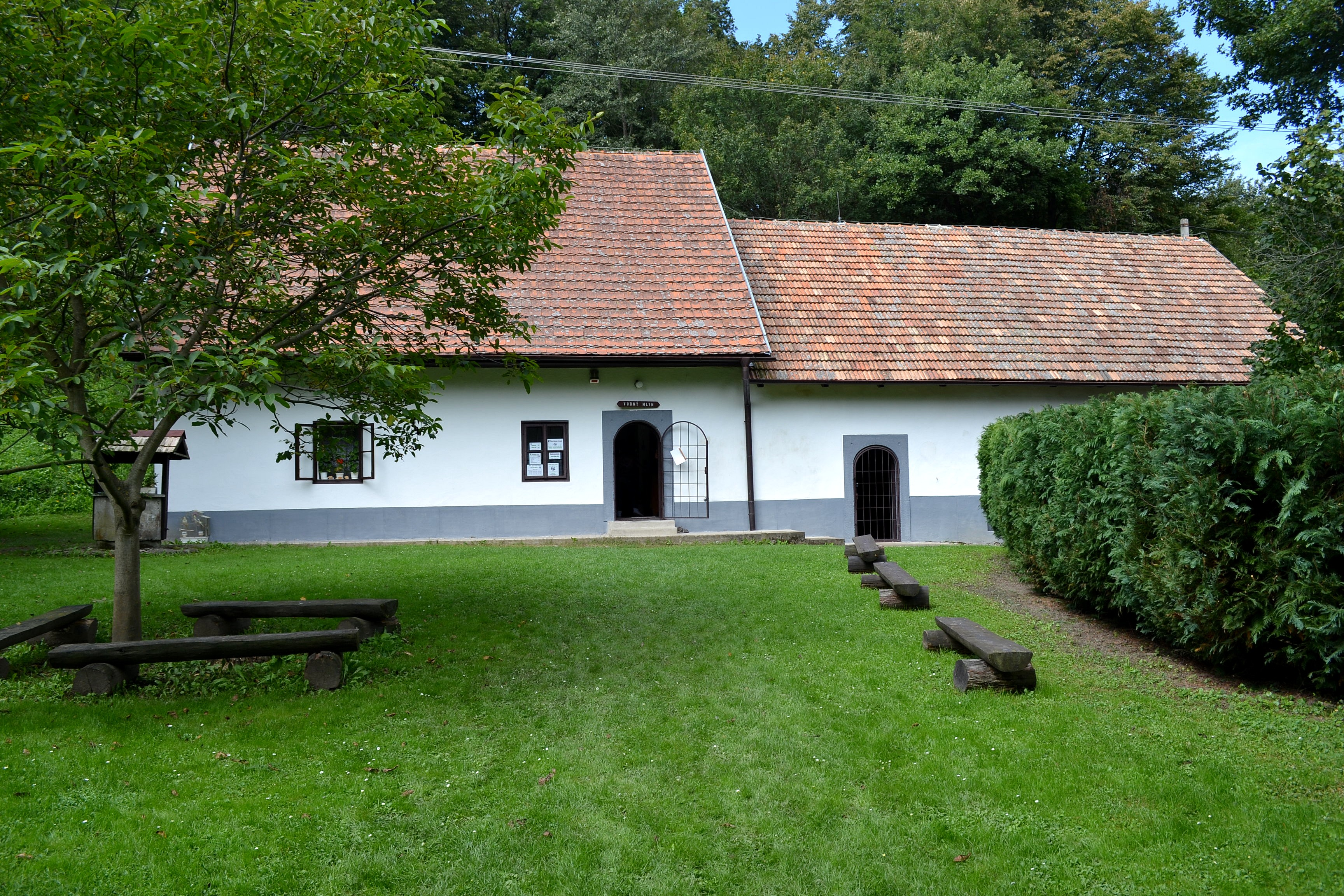 Celkový pohľad na objekt mlyna a okolie